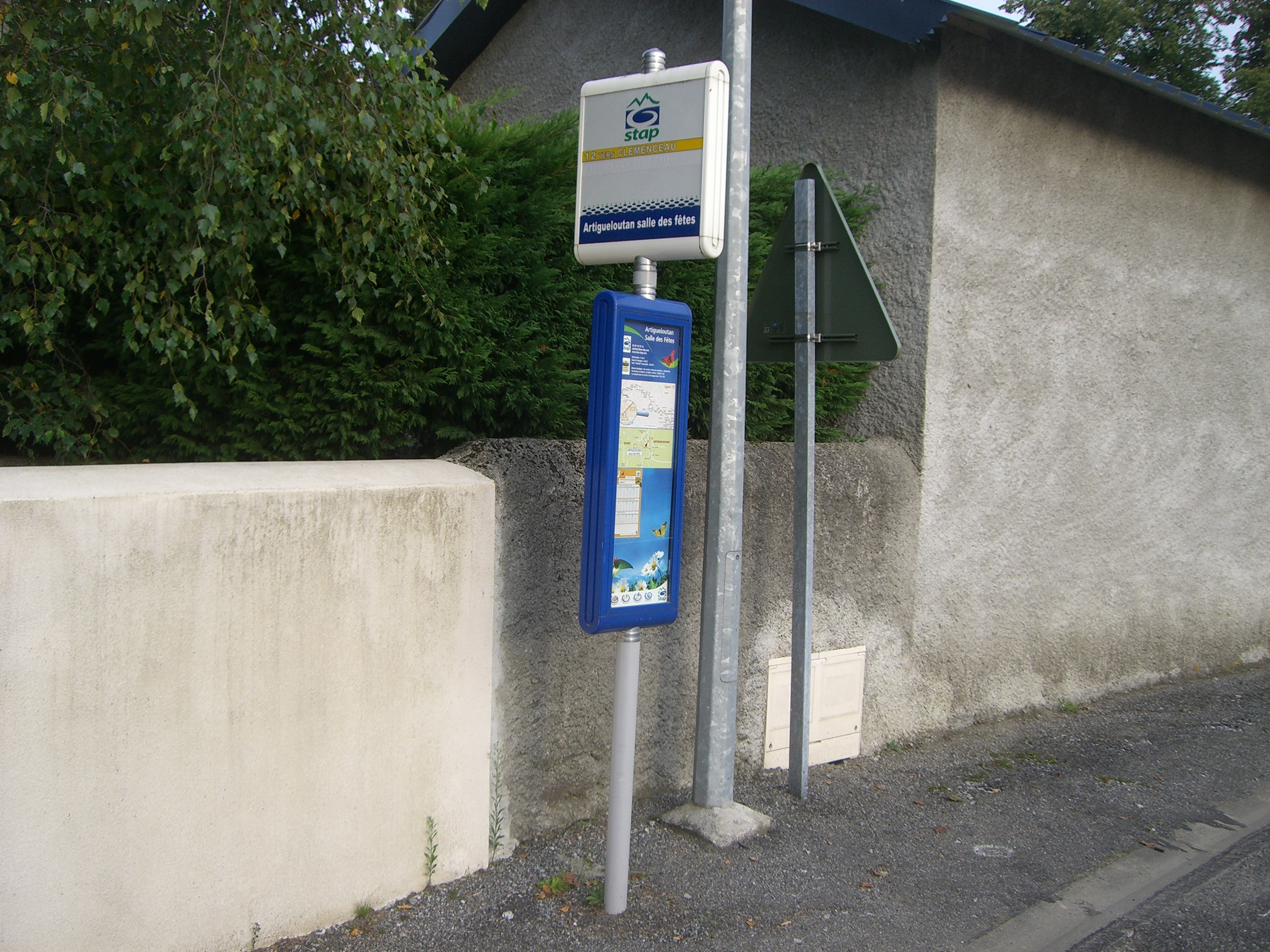 Terminus ligne 12 Artigueloutan Salle des Fetes Stap